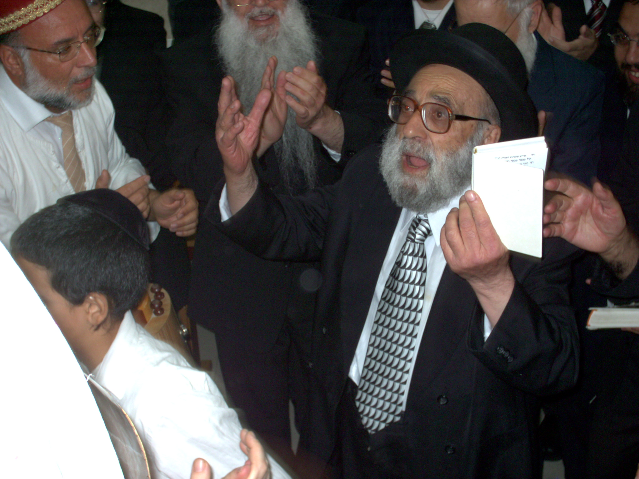 הרב יהודה מועלם מזמר ורוקד בעת ההקפות שניות